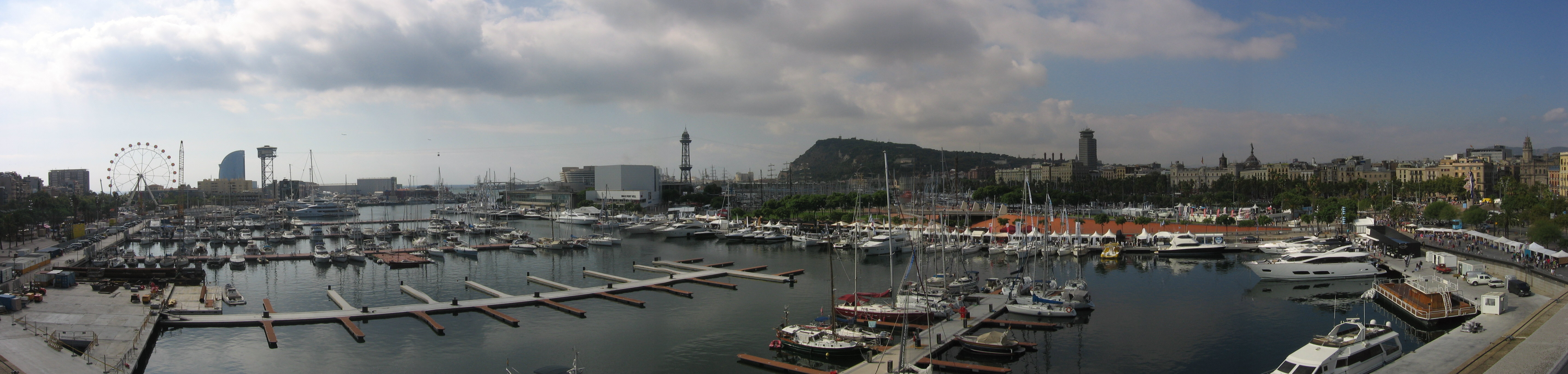 Puerto de Barcelona.